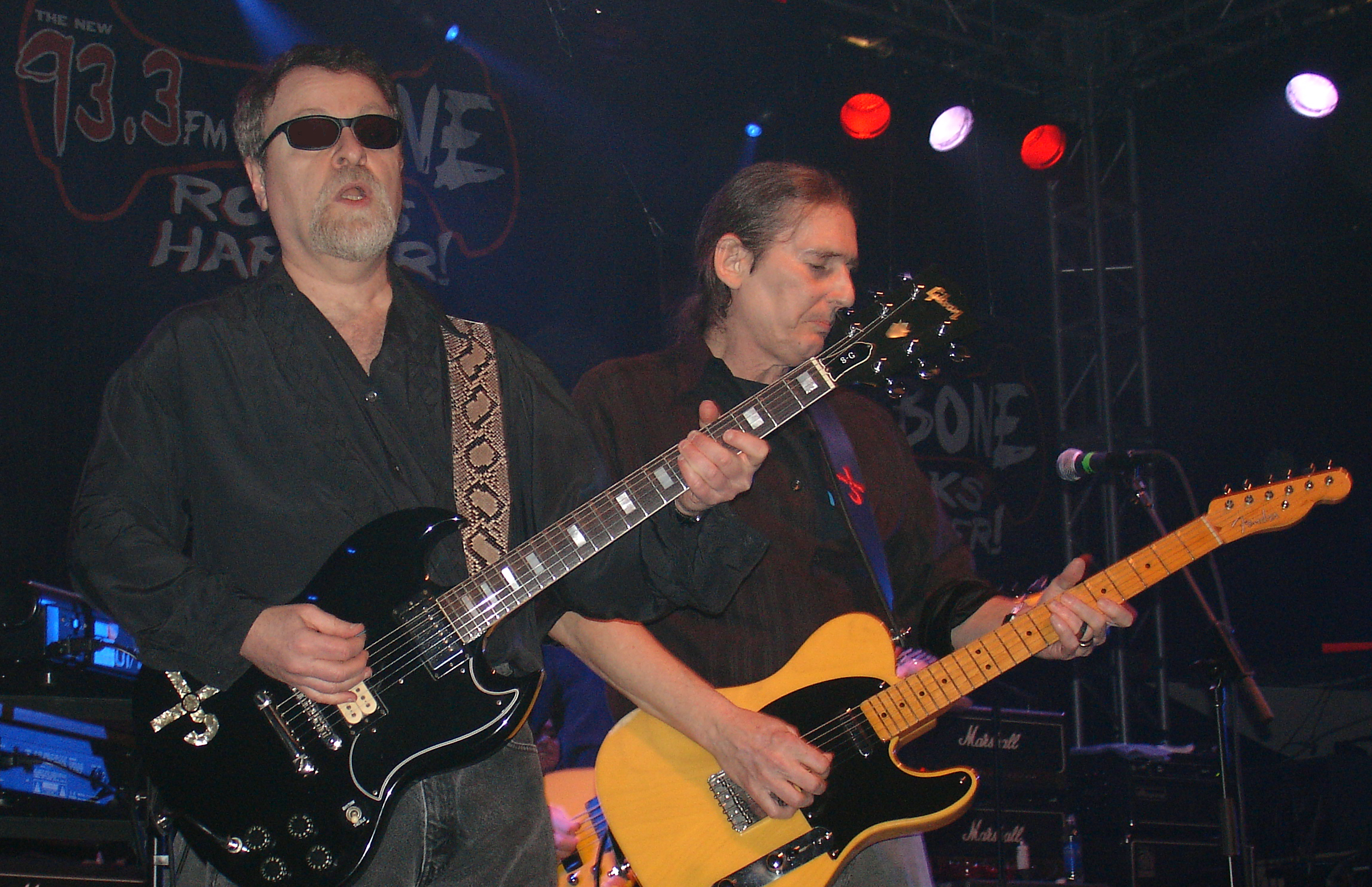 Blue Öyster Cult